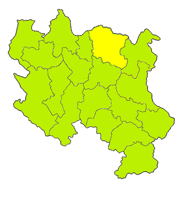 Map of Braničevo